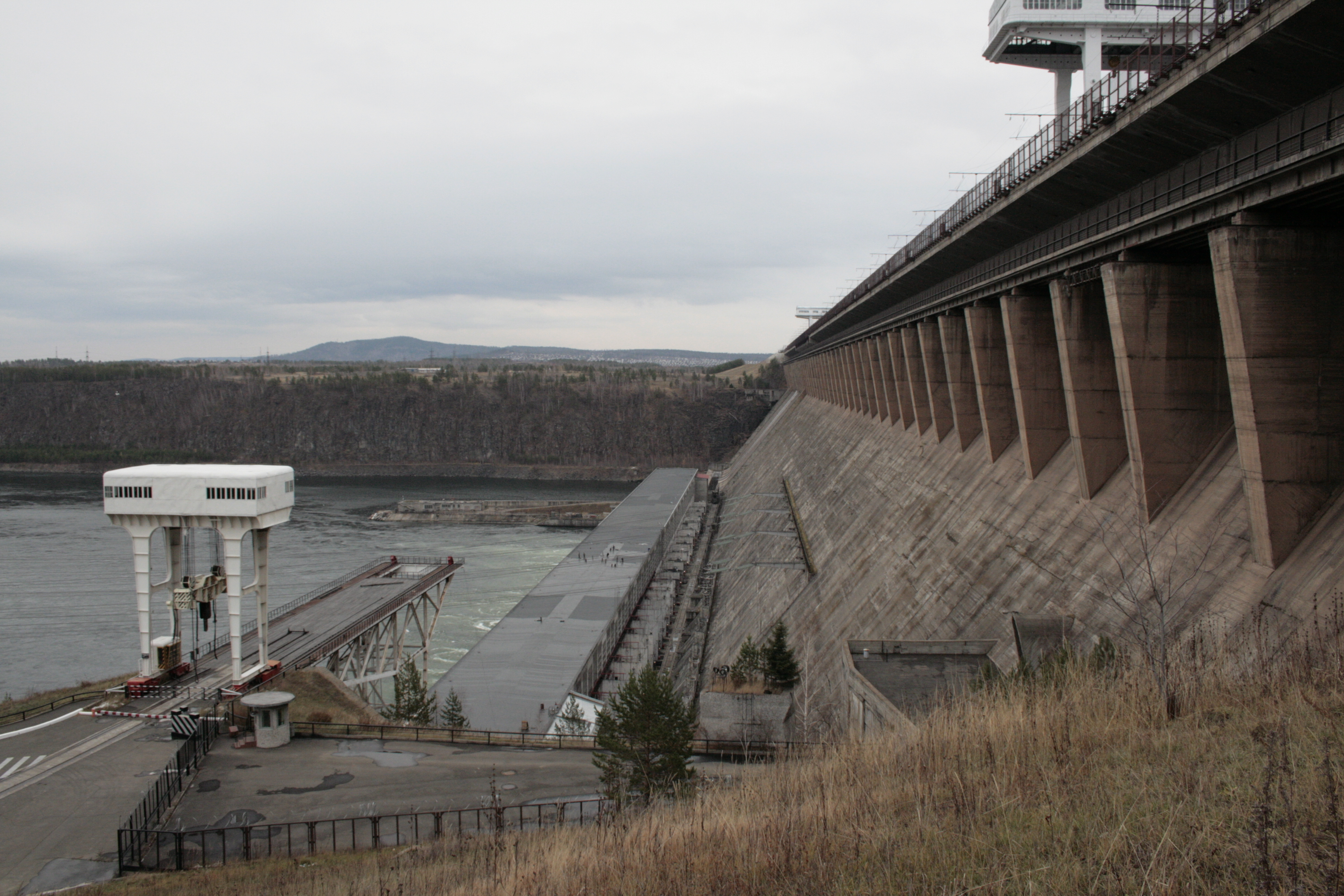 Братская ГЭС окт.2008 Гуренчук Павел